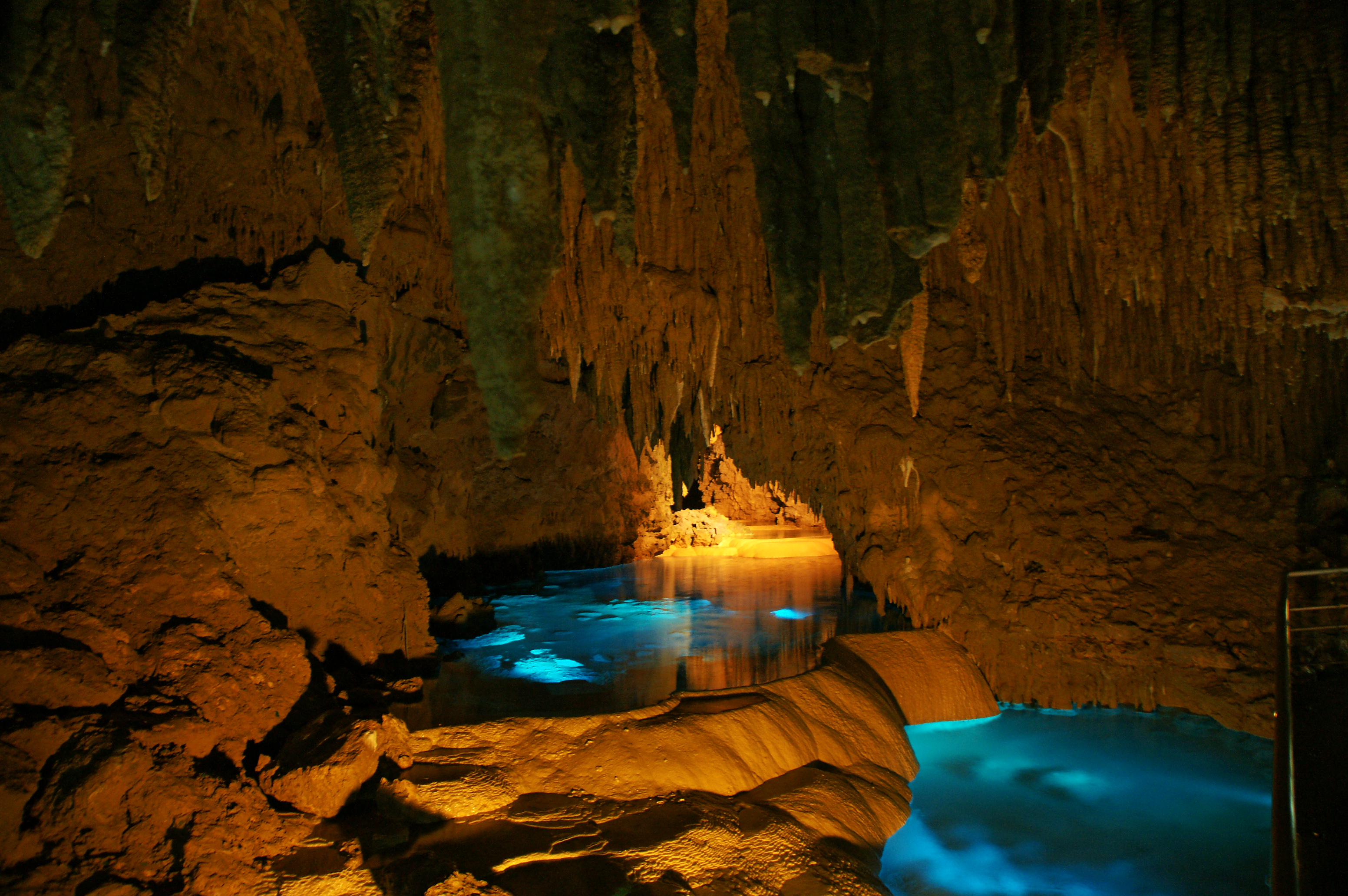 玉泉洞青の泉。